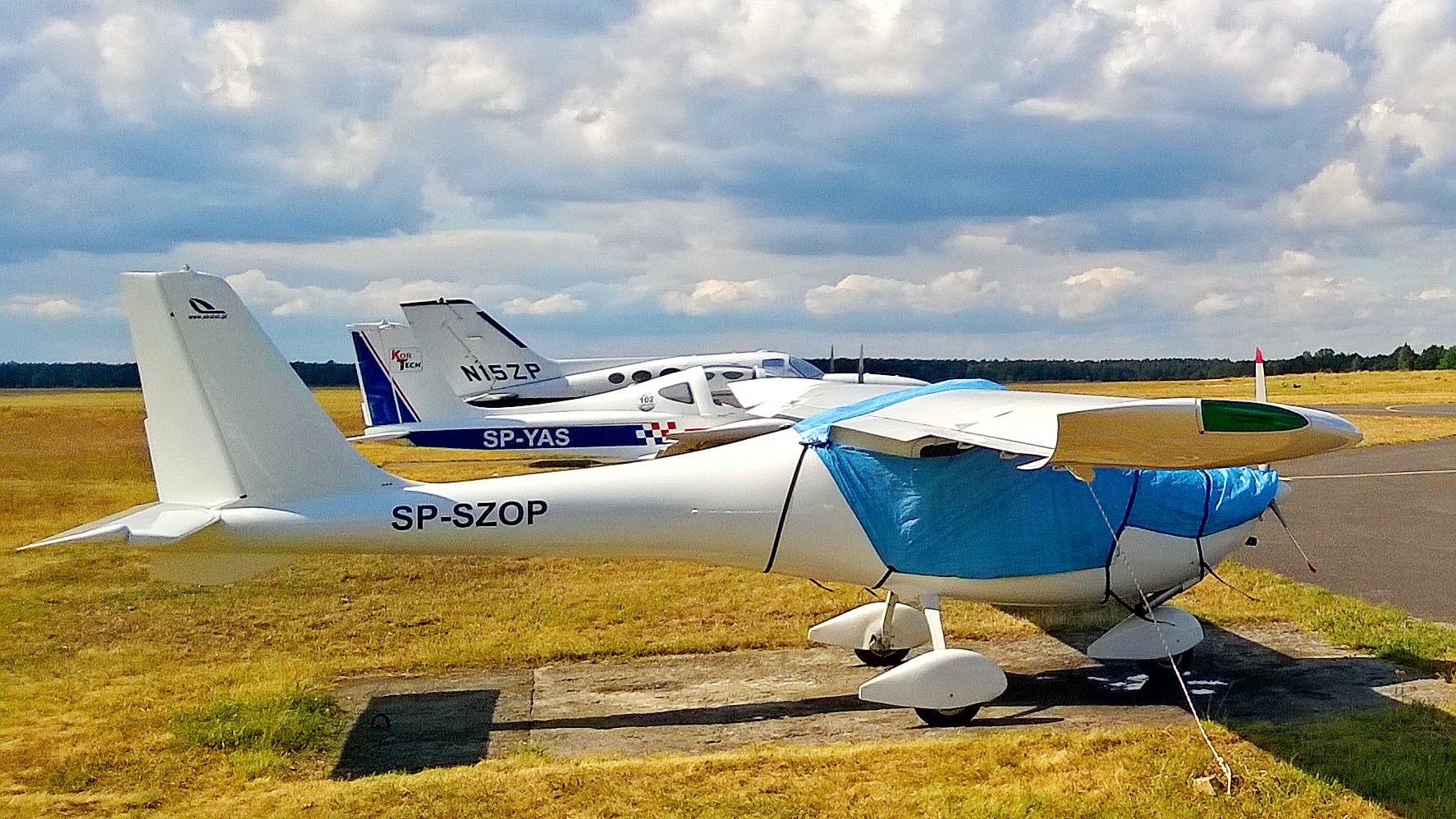 Fragment toruńskiego lotniska2